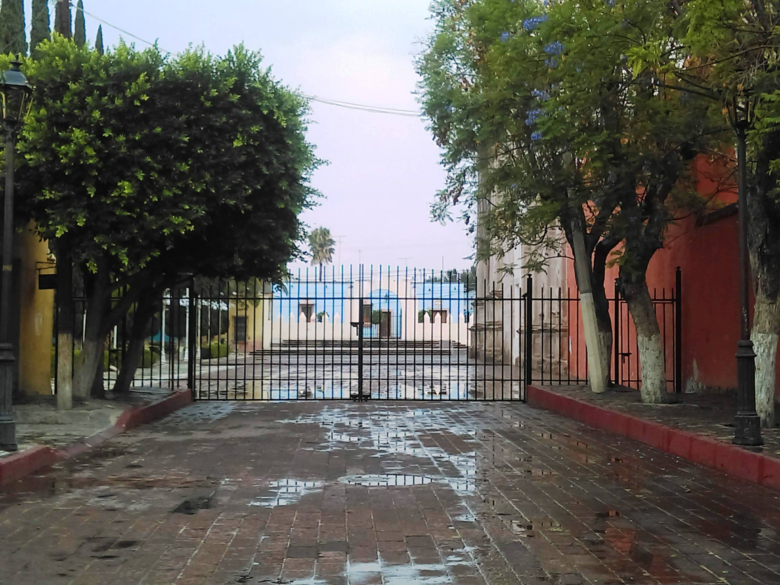 Templo y exconvento de San Nicolás de Tolentino en Actopan, Hidalgo, México.